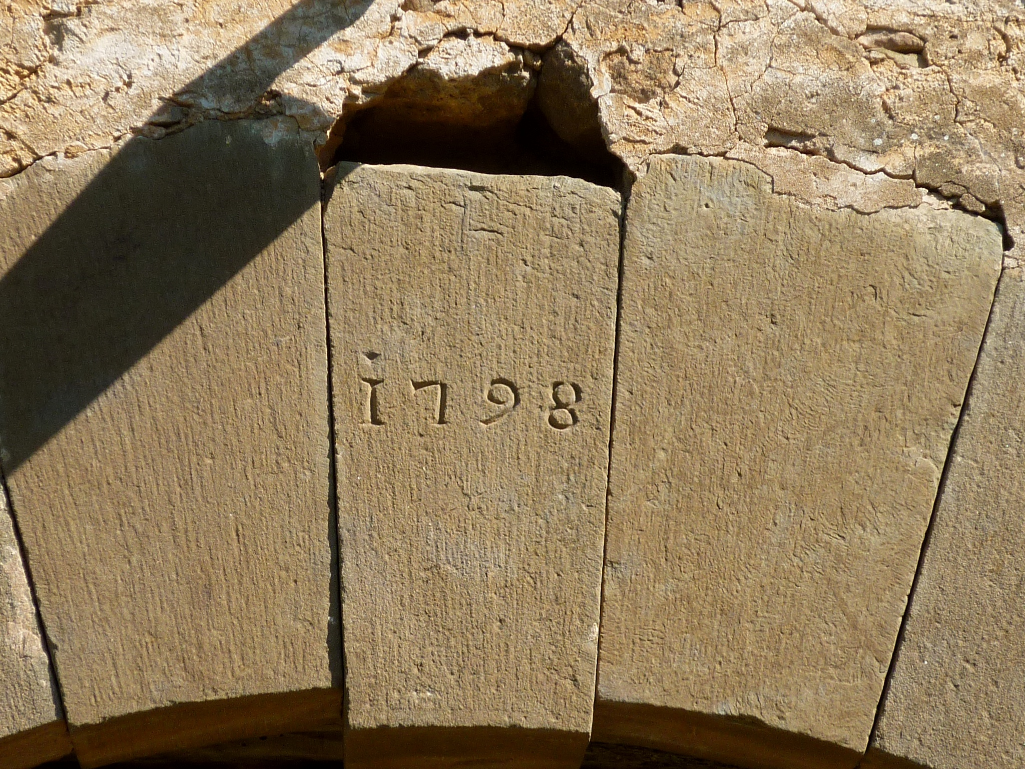 Casa pairal a la Torre de Rialb: clau de volta amb data (la Baronia de Rialb)